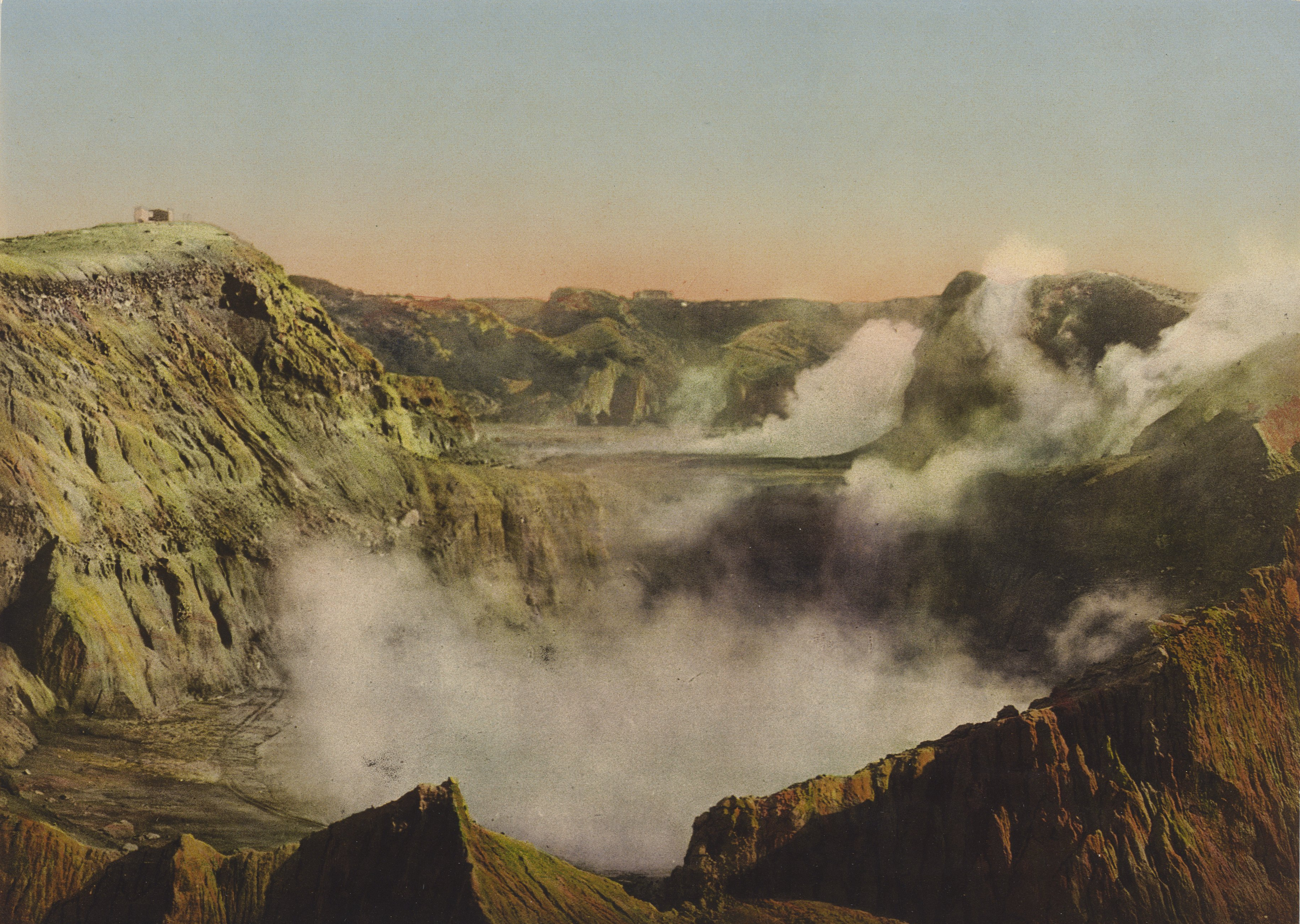 Waimangu Geyser. From near Inferno